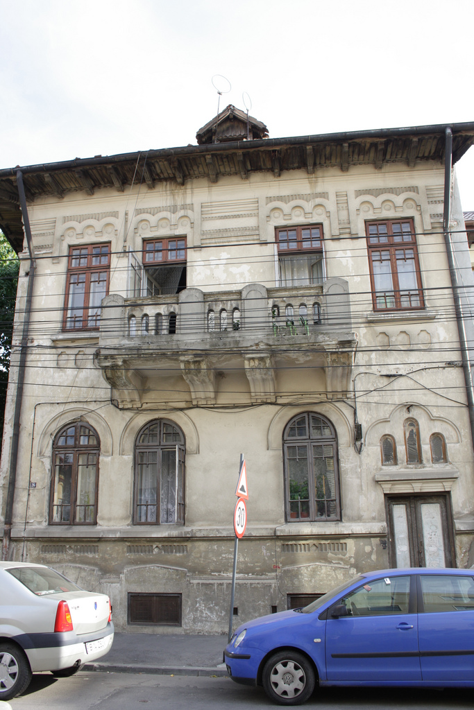 Casă, Str. Alexandrescu Grigore 26 sector 1